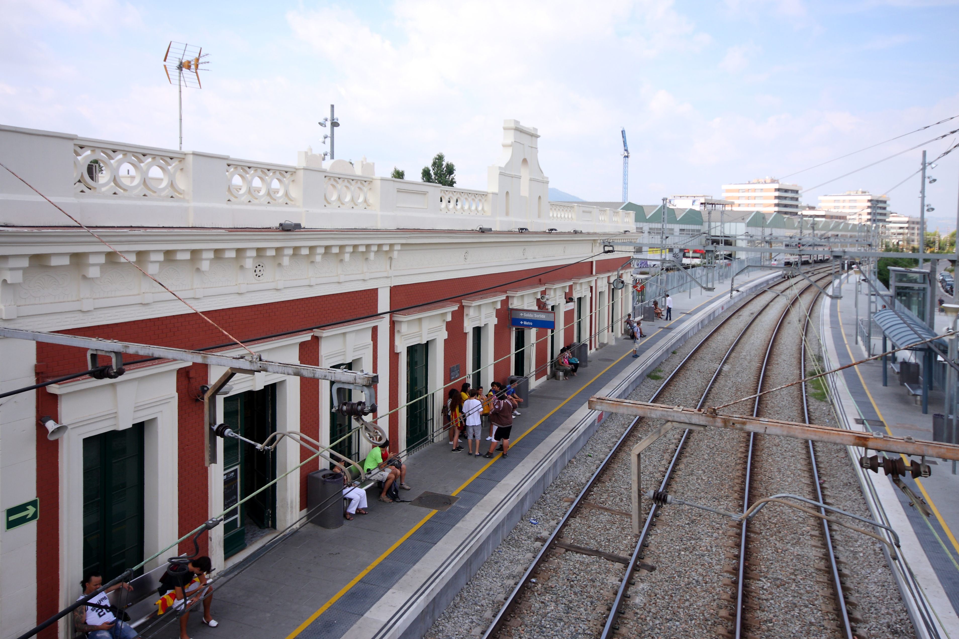 Estación cercanías Adif/Renfe - Cornellà (andén) Plaza de la estación s/nº